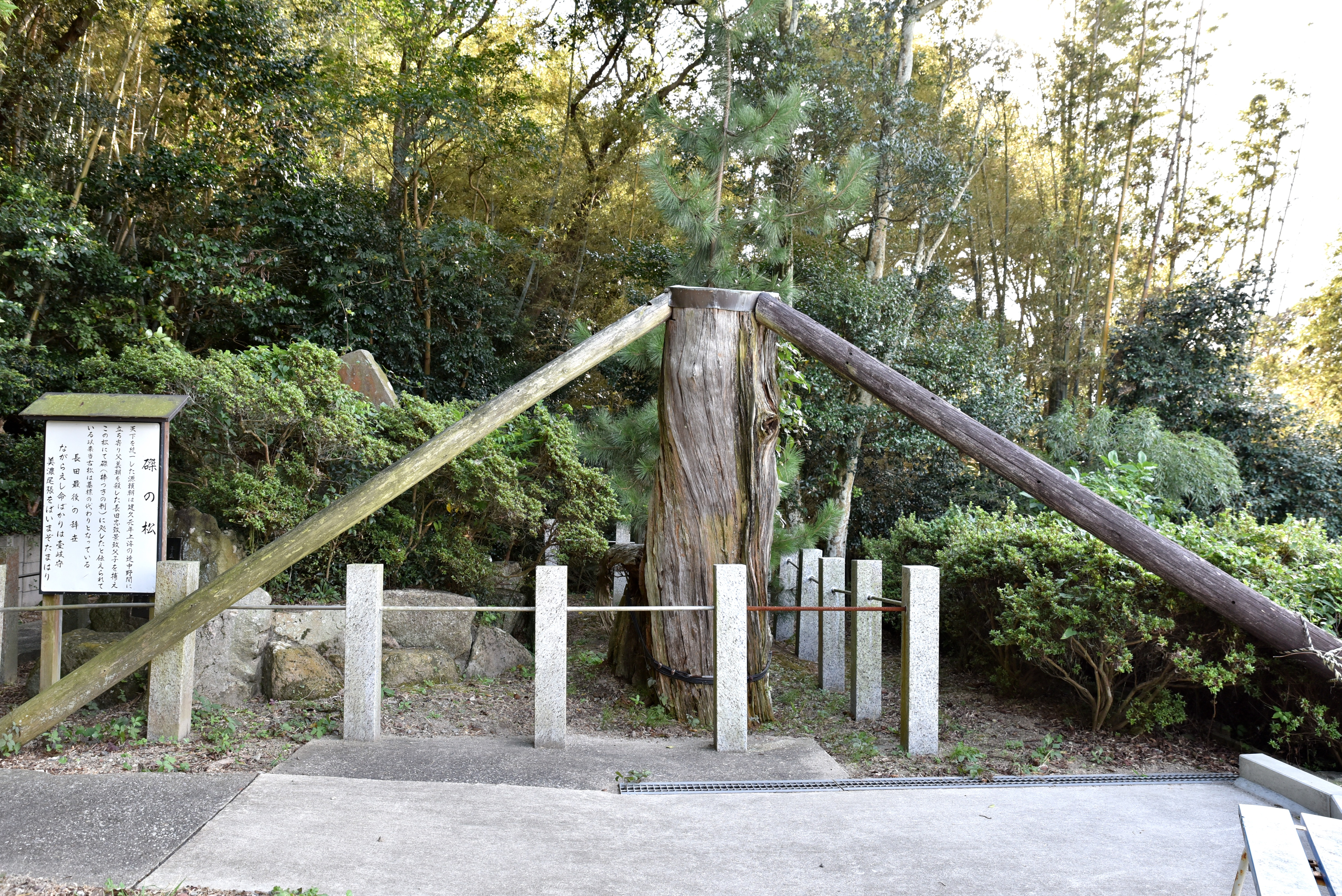 長田父子はりつけの松跡地